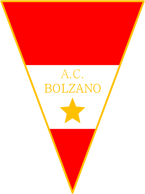 Gagliardetto Bolzano Calcio anni 1960